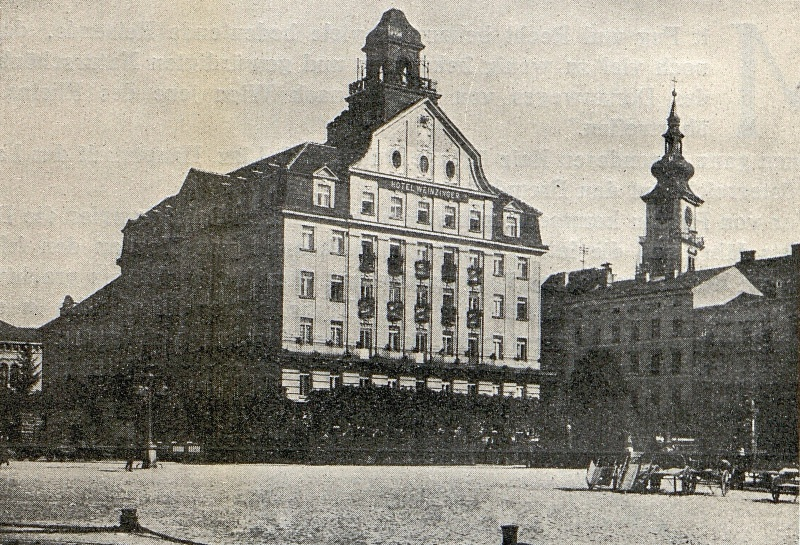 Linz, Hotel Weinzinger nach dem Umbau (um 1914)